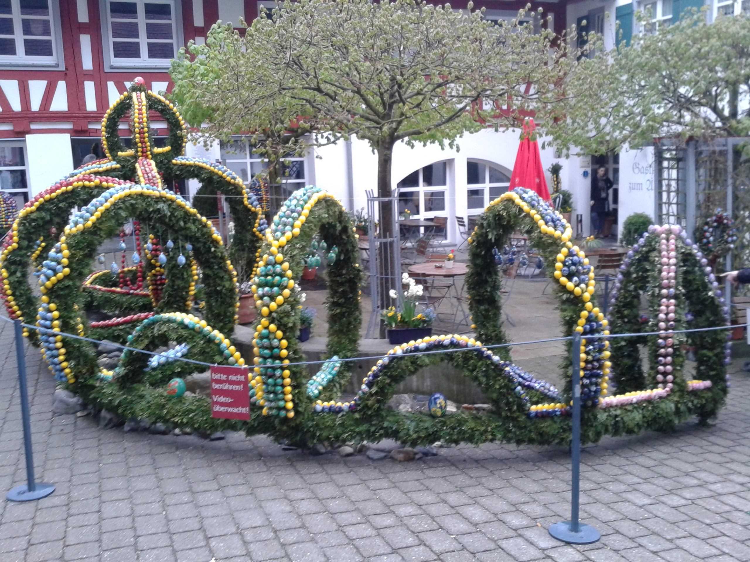 Dies ist ein Teil Deutschlands größtem Osterbrunnen 2014